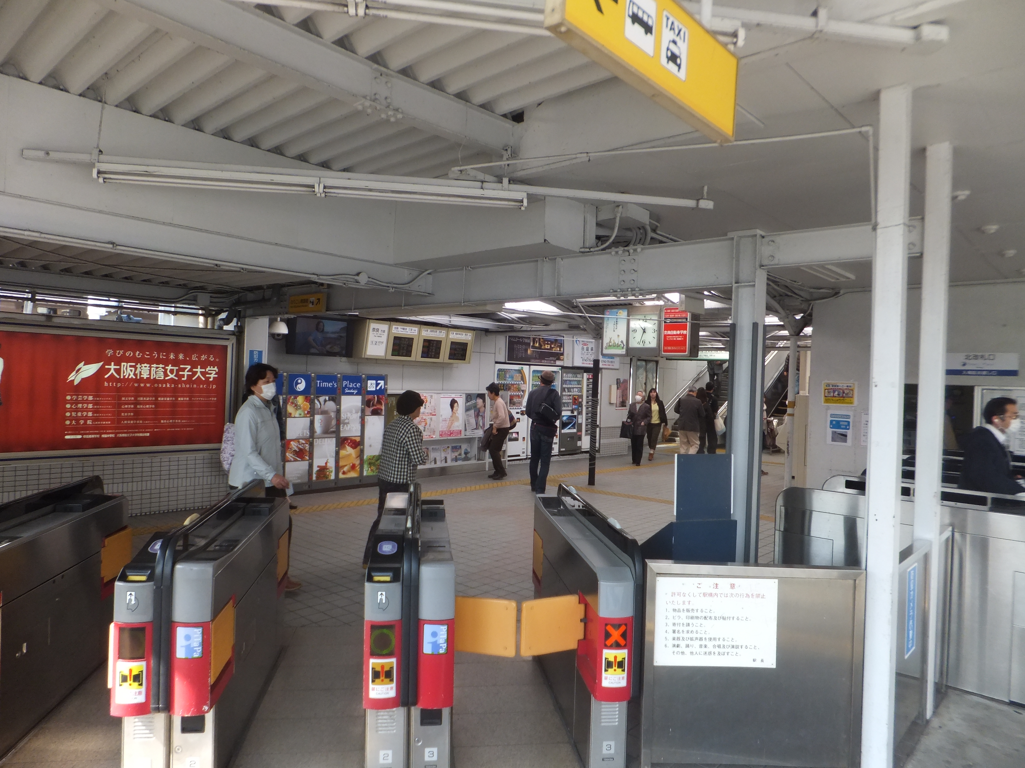 大和西大寺駅 2013年